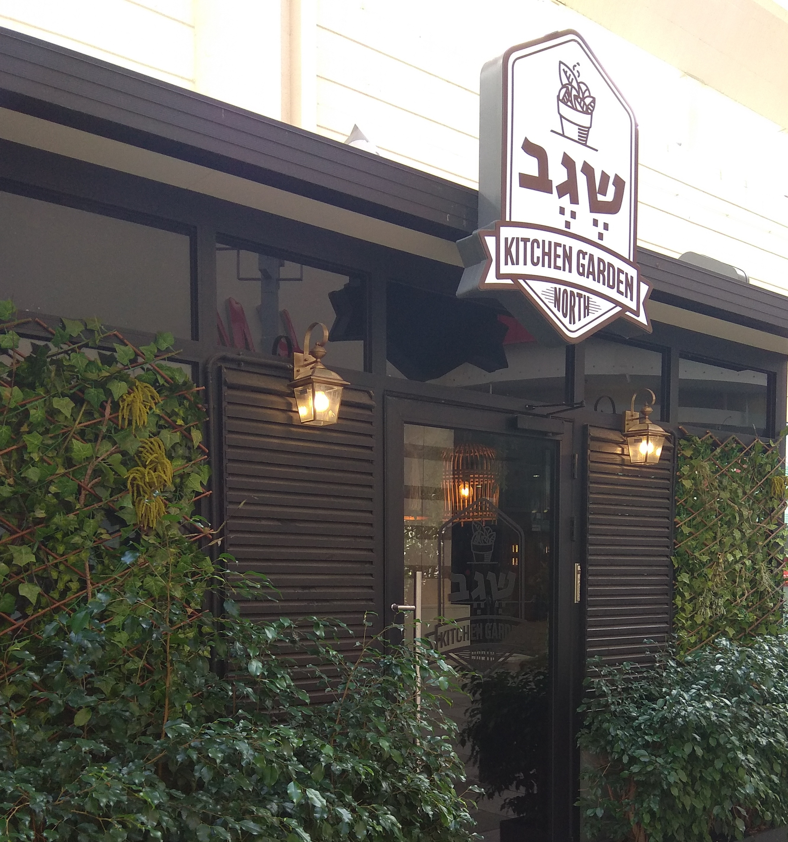 מסעדת שגב קיטשן גארדן בקריון, קריית ביאליק